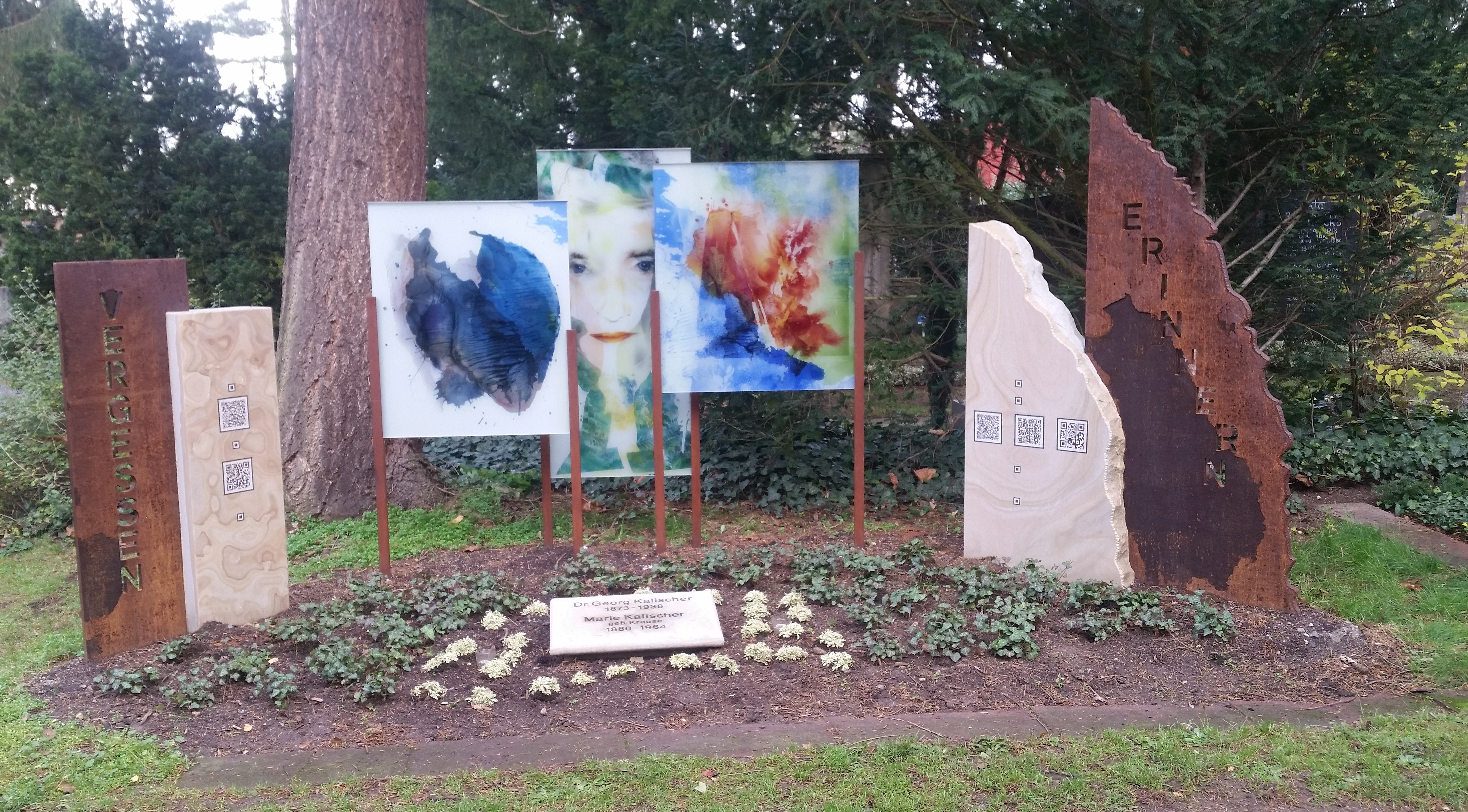 Zur Erinnerung an die Opfer des Novemberprograms 1938 im Frankfurter Stadtteil Sachsenhausen und an die Eheleute Kalischer